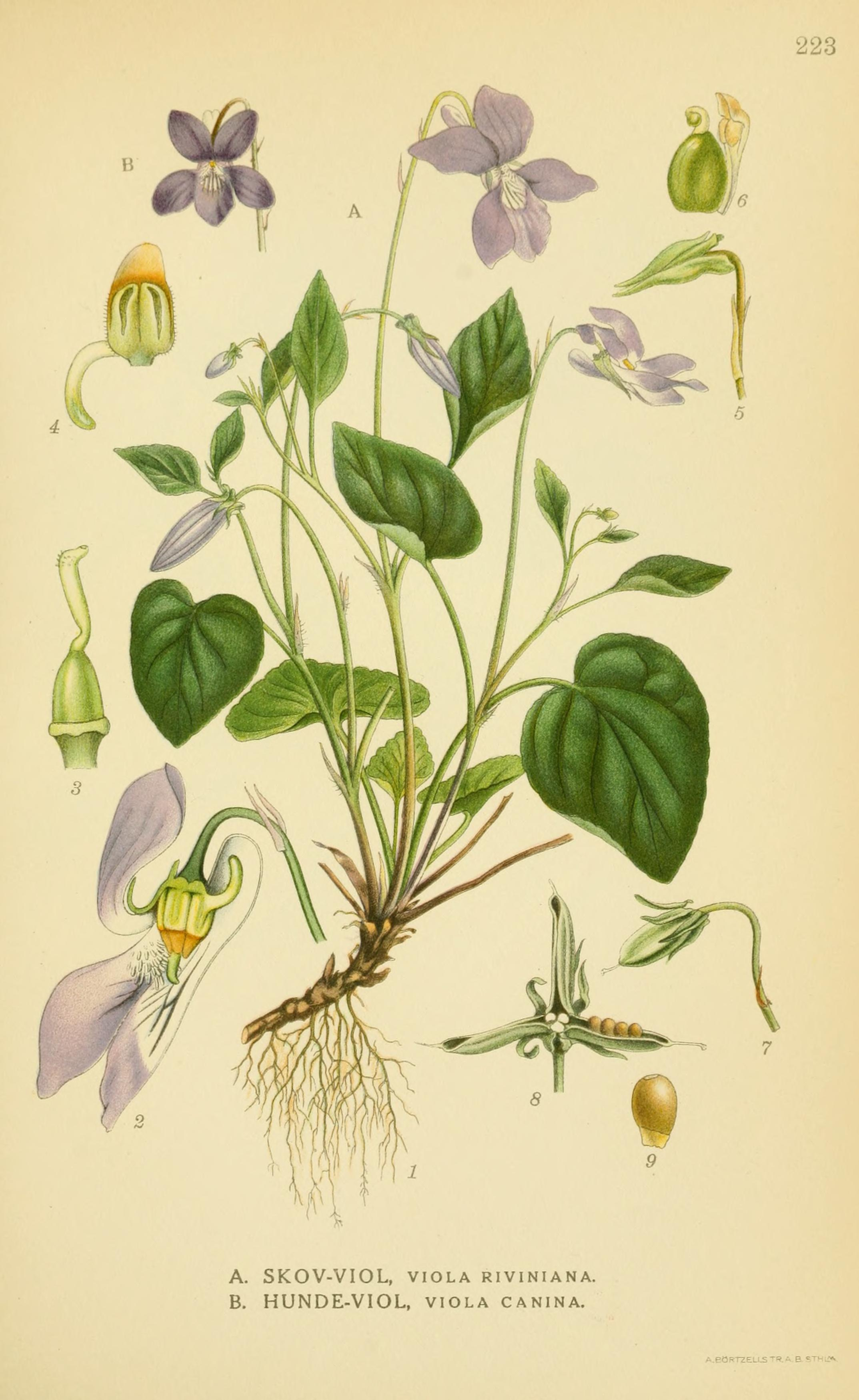 Billeder af nordens flora, ved A. Mentz og C.H. Ostenfeld.